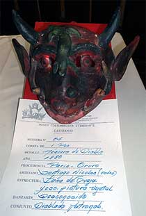 Mascara de 1880 de la comparsa de diablos de paria (diablada), mascarero santiago nicolas (padre), de paria en Oruro bolivia, la mascara se encuentra actualmente el "Museo Itinerante Supay", Descripcion: Lleva dos viboras en el rostro y un lagarto en la frente.